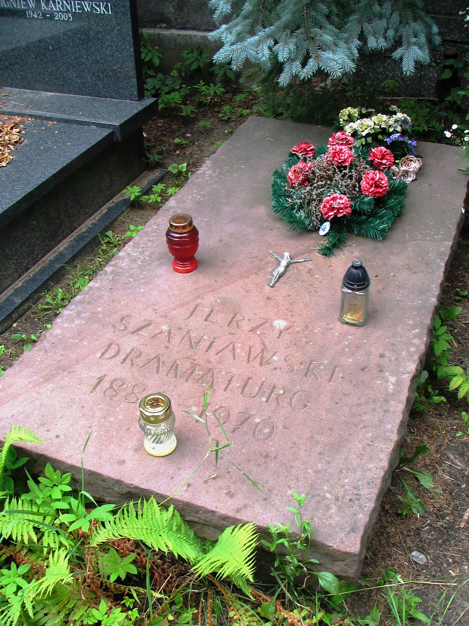 Grób dramaturga Jerzego Szaniawskiego